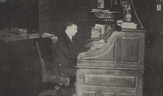 Julio Pérez Canto (1867-1953), director de El Mercurio de Valparaíso